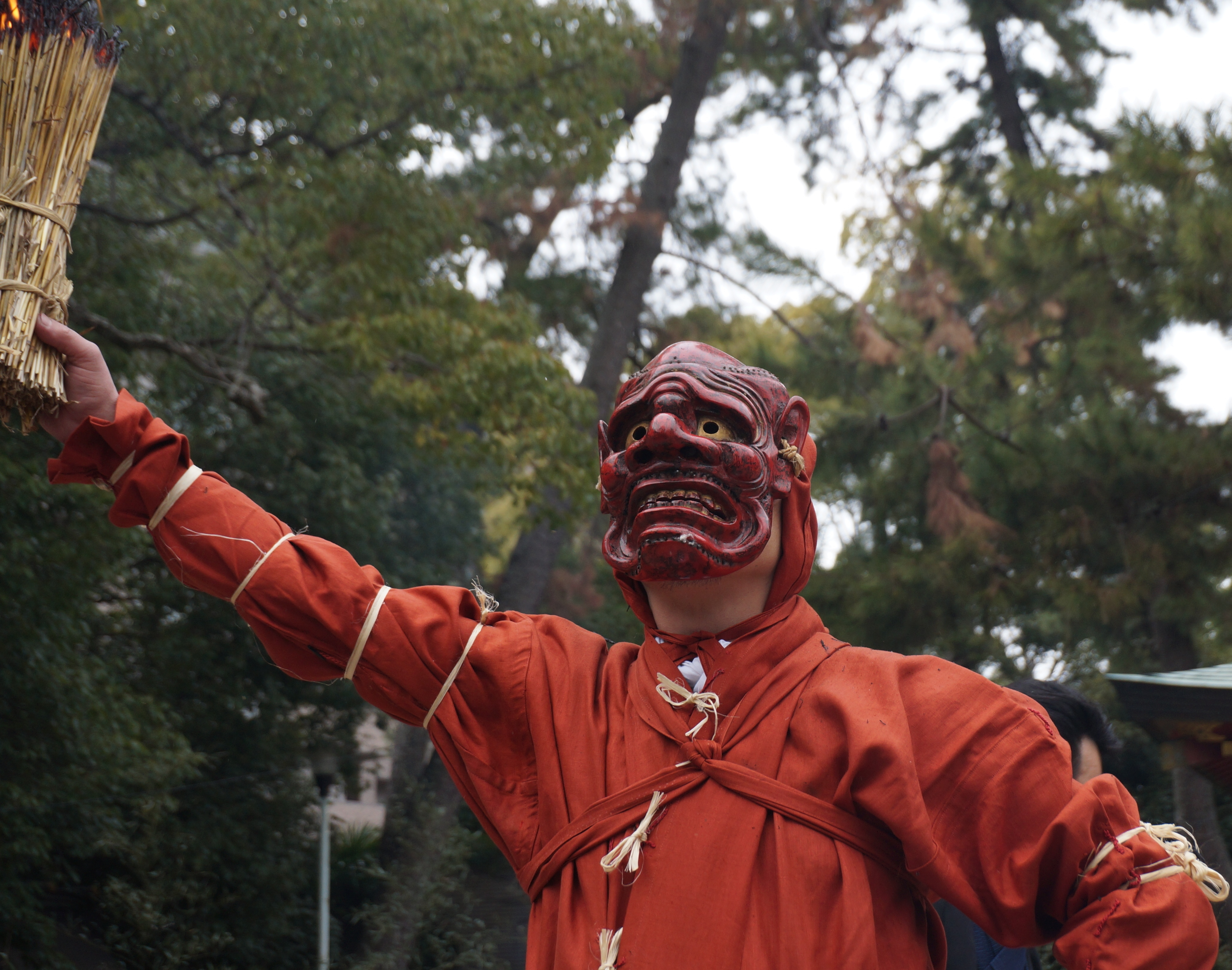 Aka oni (le démon rouge)